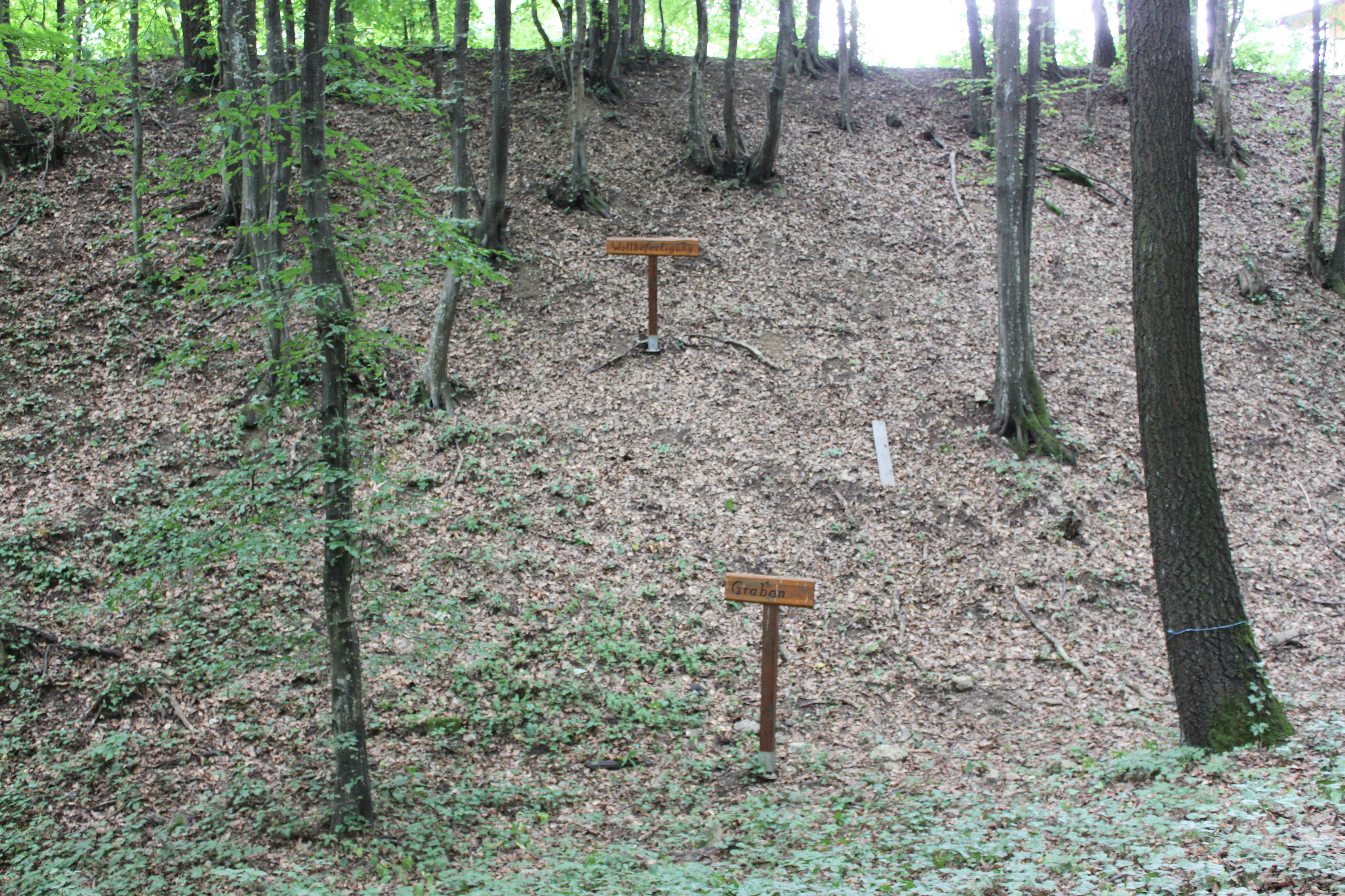 Befestigte Höhensiedlung Burgstall